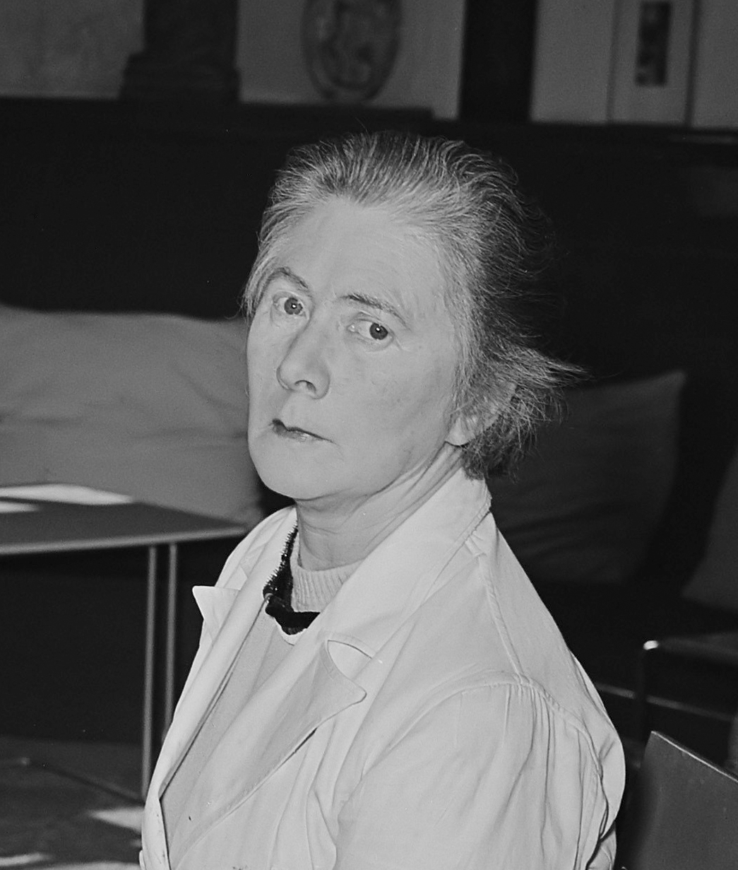 Charley Toorop wordt op 24 maart 60 jaar 3 maart 1951